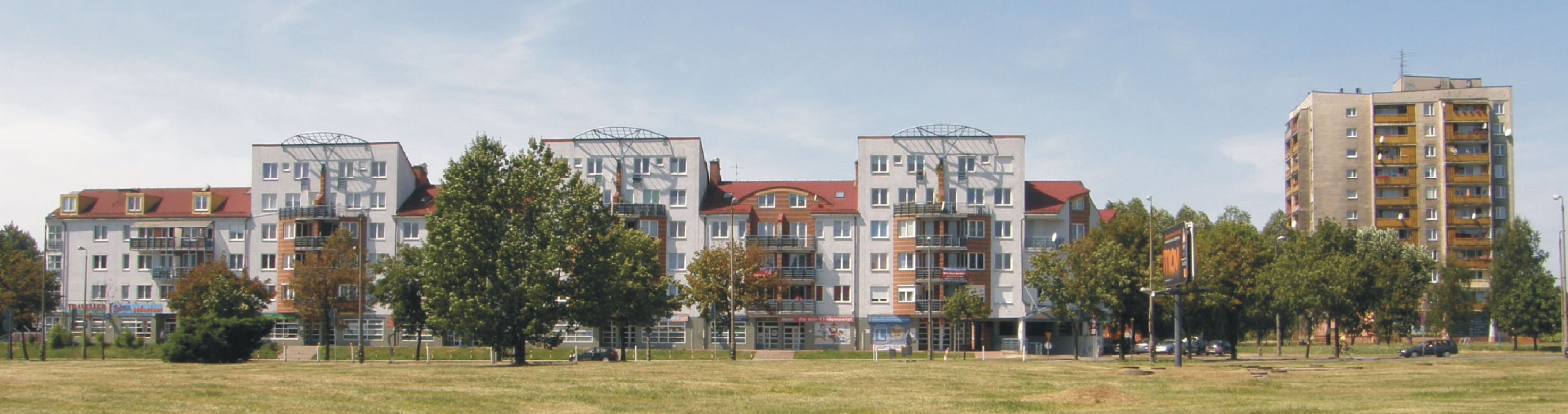 Tychy - Al. Bielska - nowoczesne budownictwo